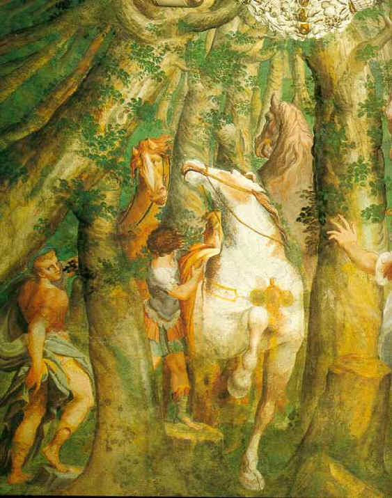 Per Armida